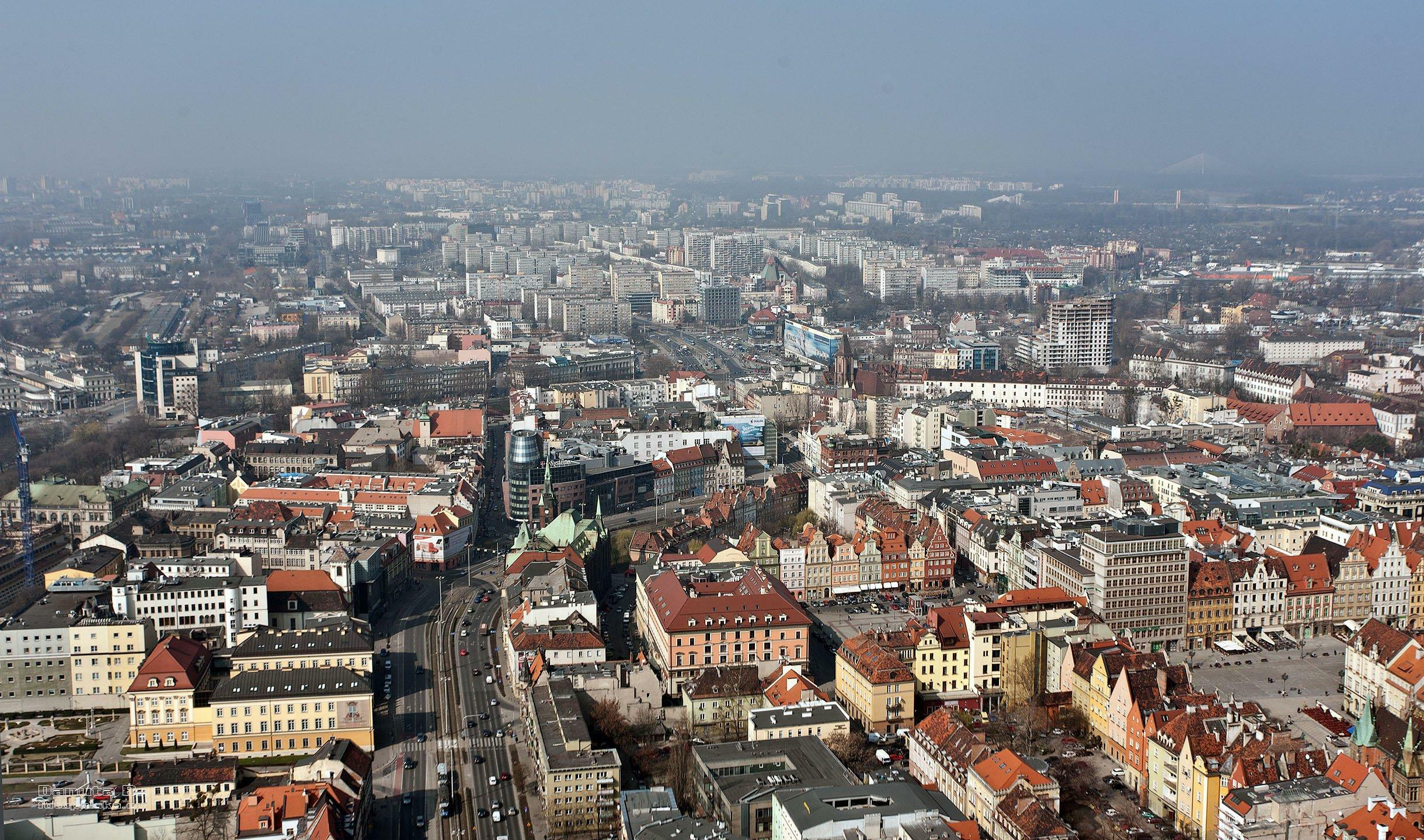 Widok od rynku (z prawej) w kierunku zachodnim.